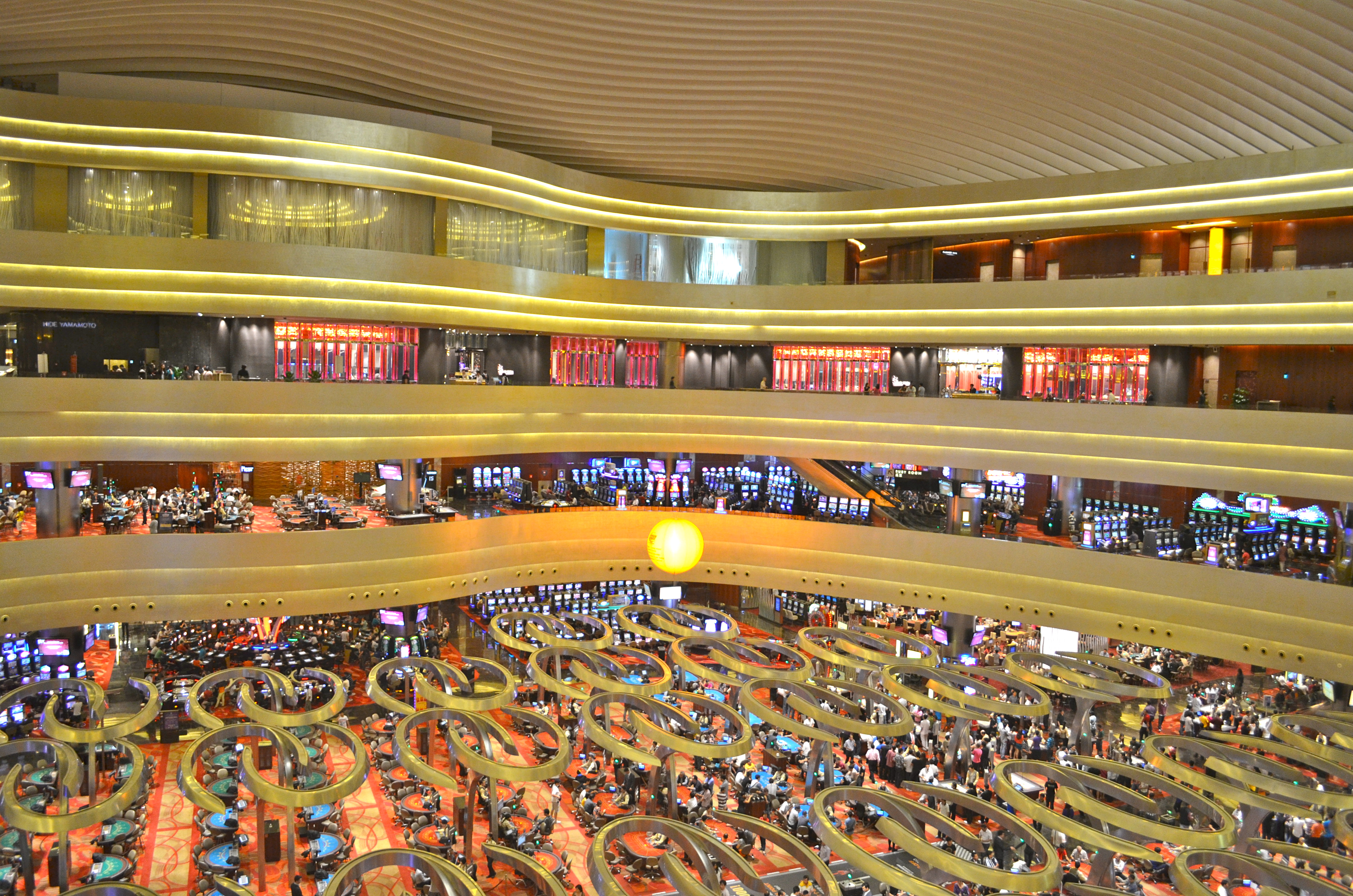 Marina Bay Sands. Singapore. August 2013.